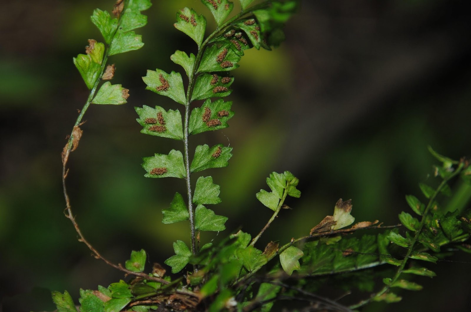 Asplenium ulbrichtii. Aspleniaceae. Fotos tomadas bajo bosque ribereño al margen del Río Negro cerca de Palmar, departamento de Río Negro y al margen del Arroyo Vera en el departamento de Soriano, Uruguay.